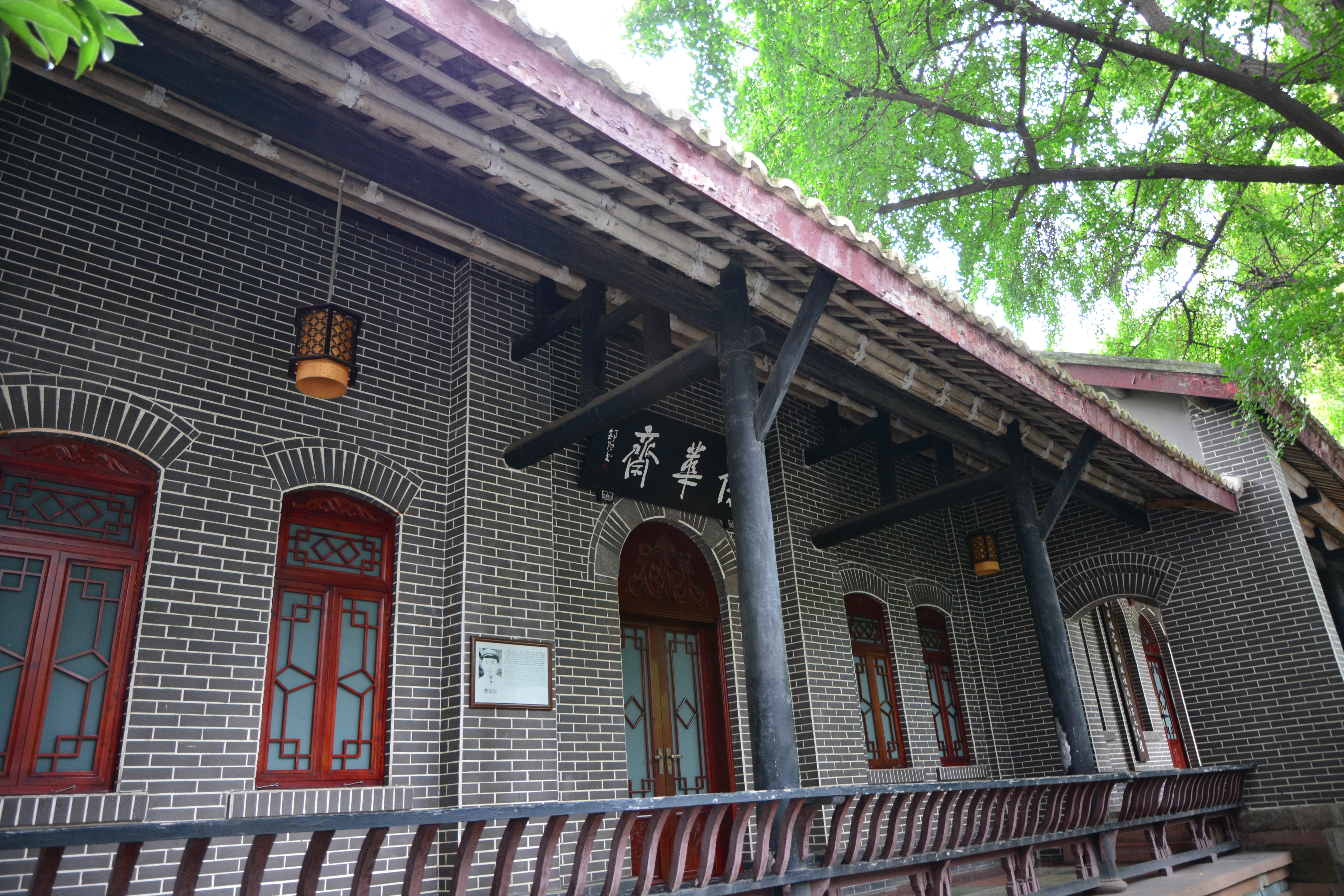 石室中学葆华斋